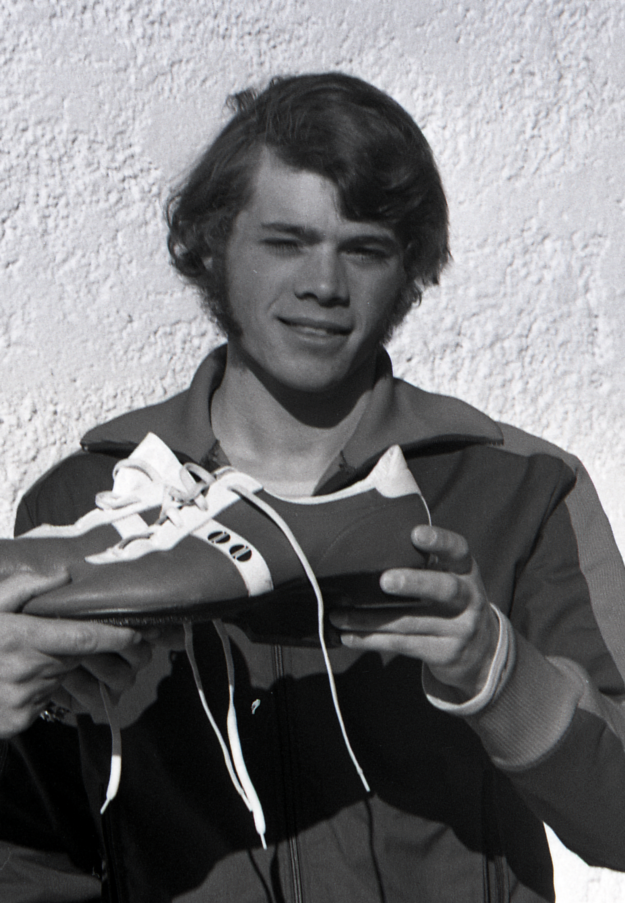 Den amerikanske langrennsløperen Bill Koch tok sølv på 3-mila under Innsbruck-OL i 1976. Han er kjent som mannen som startet med skøyting med én fot. Her intervjues han av NRKs Gunnar Grimstad.Fotograf: Helge Bovim. Kilde: Riksarkivet, PA-0797 Billedbladet NÅ, konvolutt 8816II.